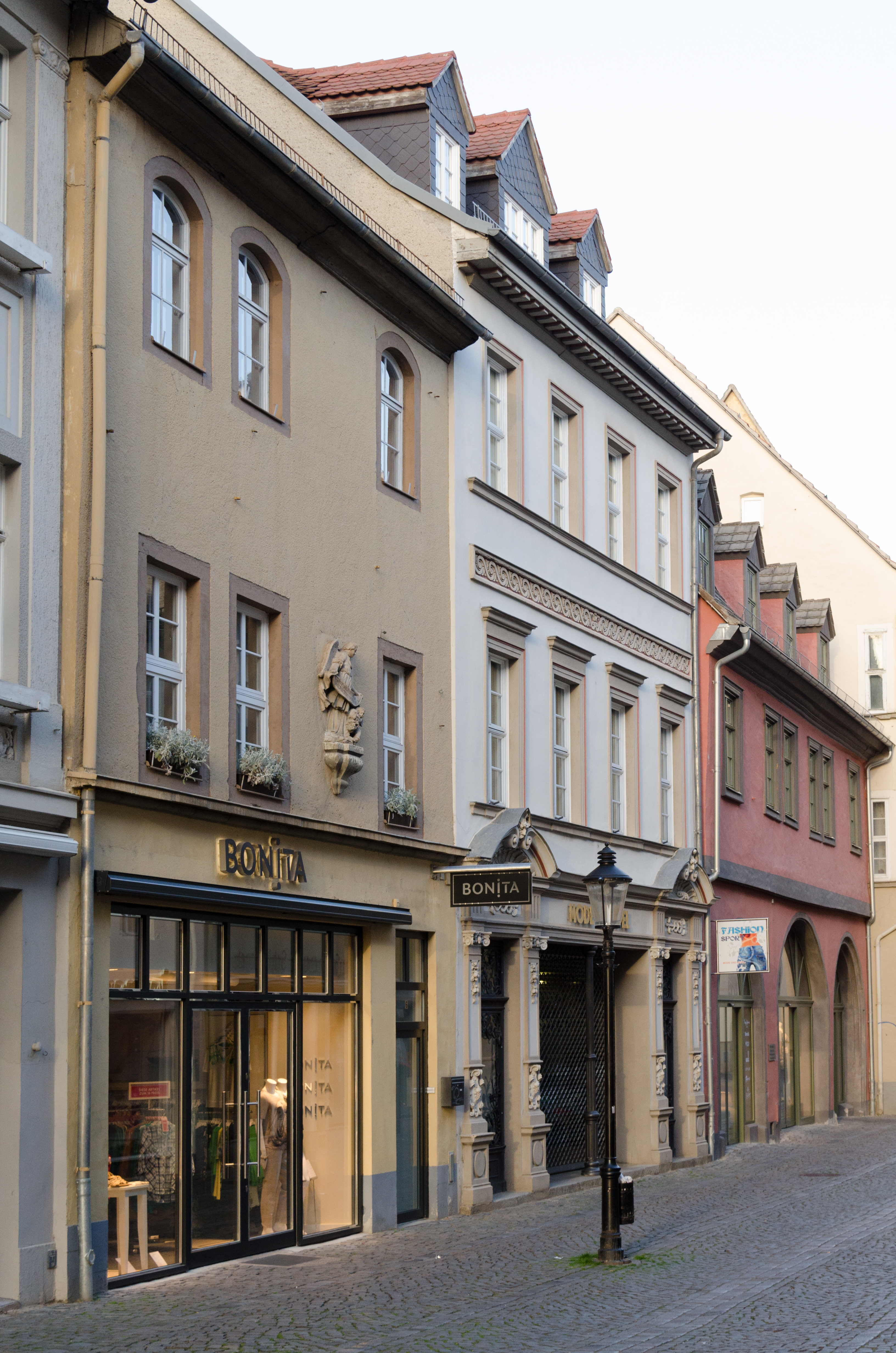 Naumburg, Herrenstraße 6, 5